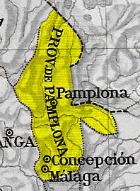 Mapa de la Provincia de Pamplona en 1810 y 1830